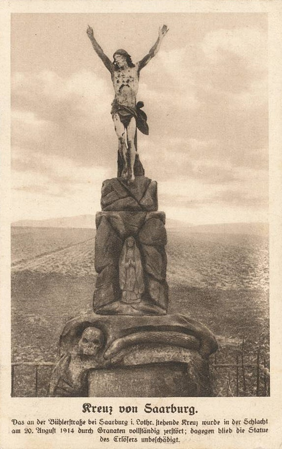 Sogenanntes Kreuz bei Saarburg (in Buhl stehend), dem am 20.8.1914 das Kreuz wegeschossen wurde und die Christusfigur stehen blieb